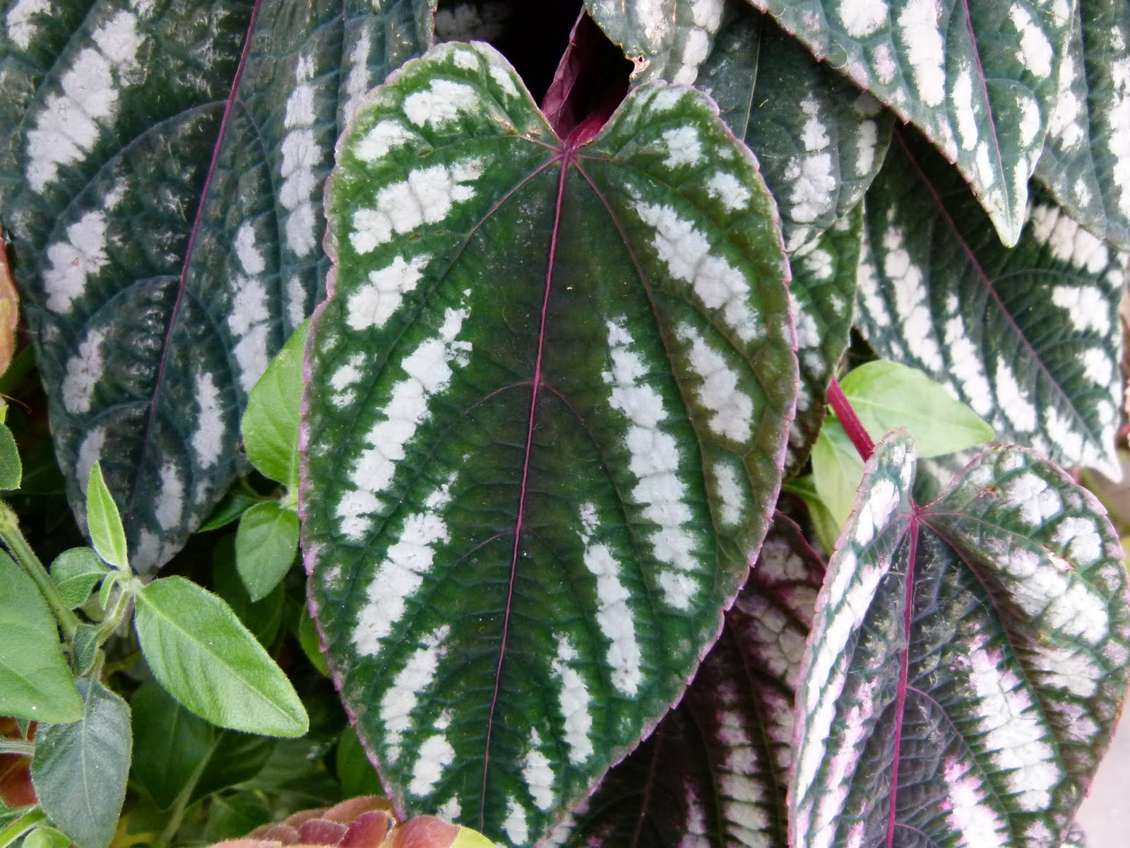 Serres du jardin du Luxembourg